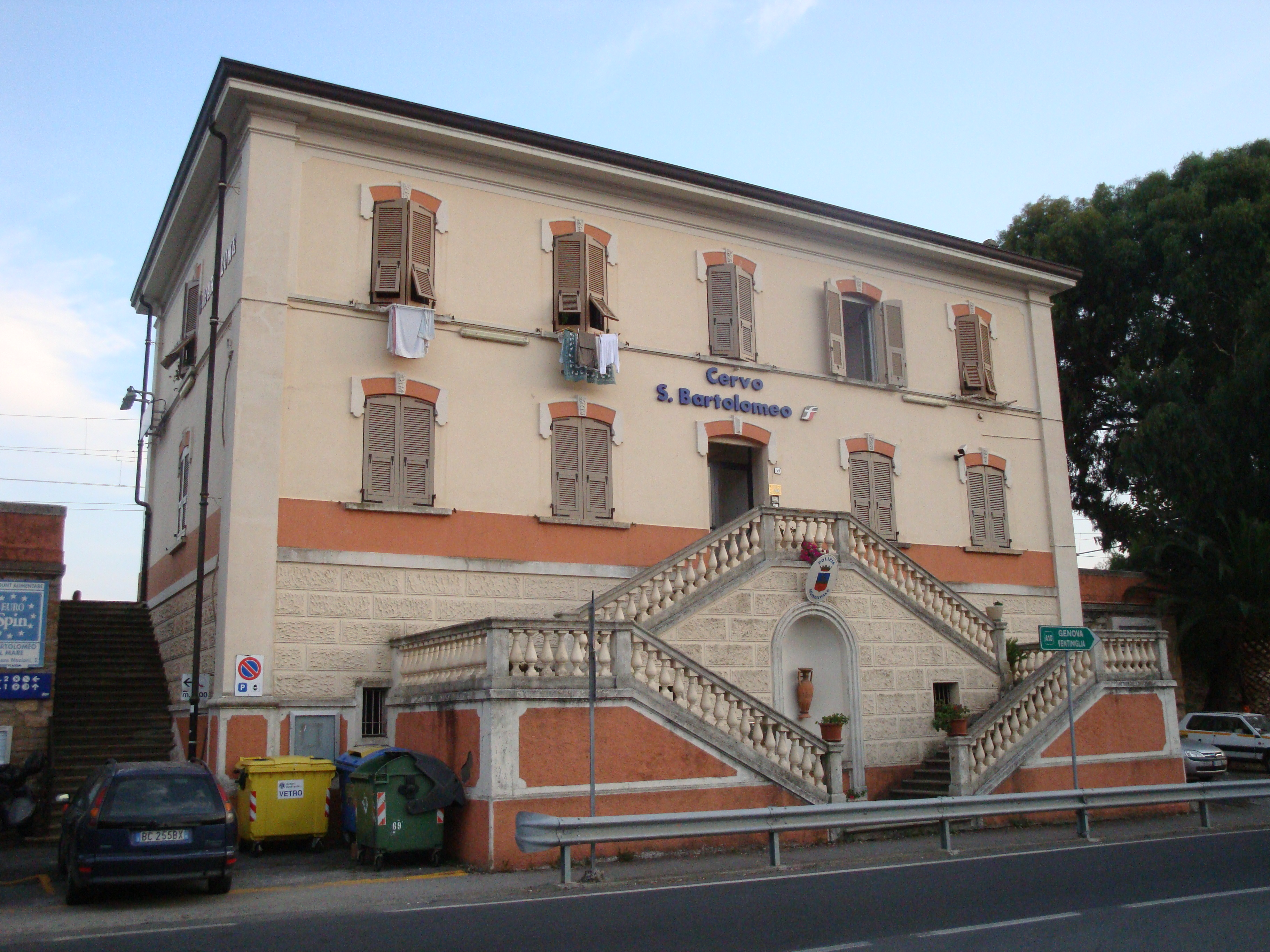 Autore: Tony Frisina - Alessandria